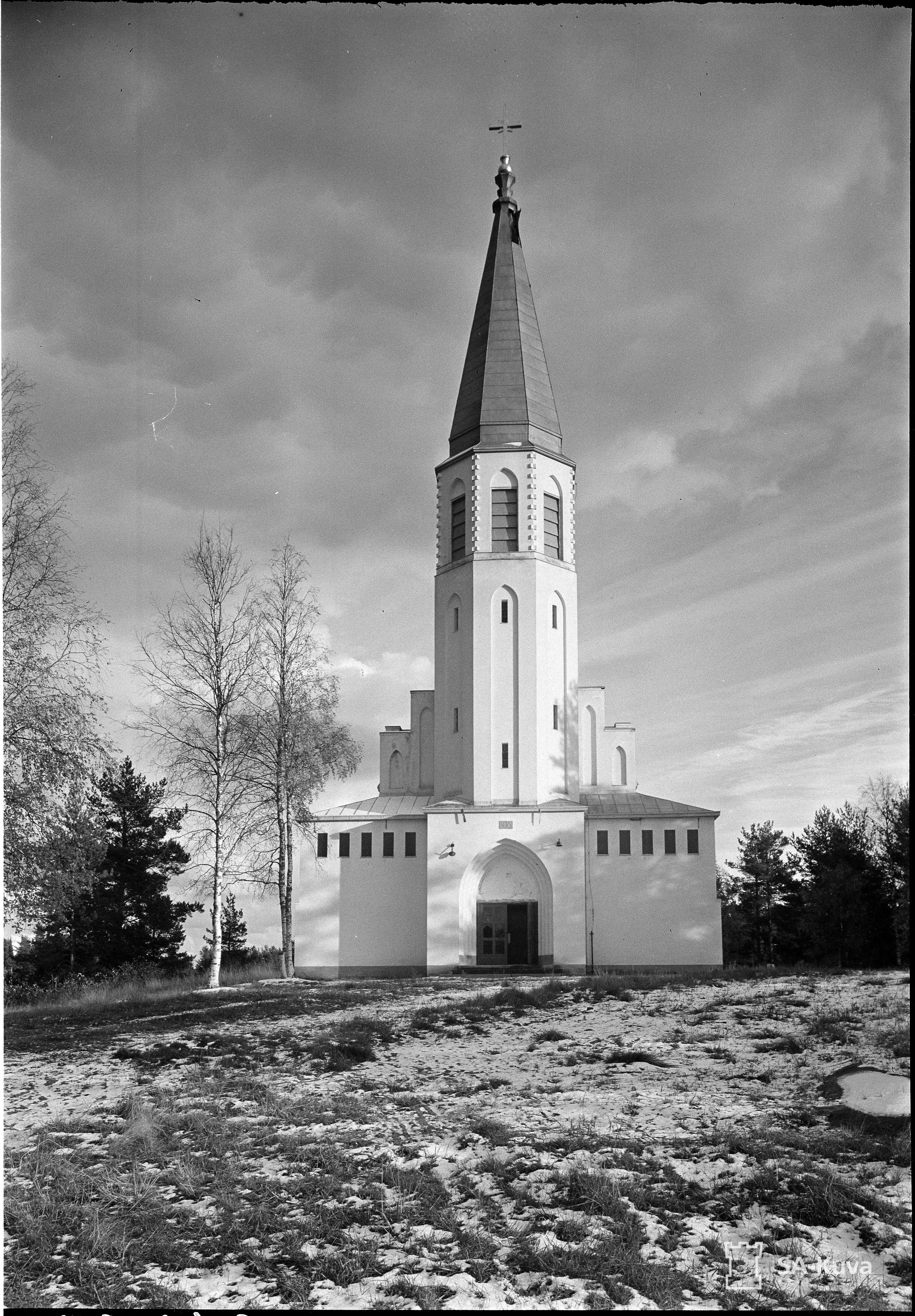 Lumivaaran kirkko joka oli kolhoosin kerhotalona. Lumivaara 1941.10.14